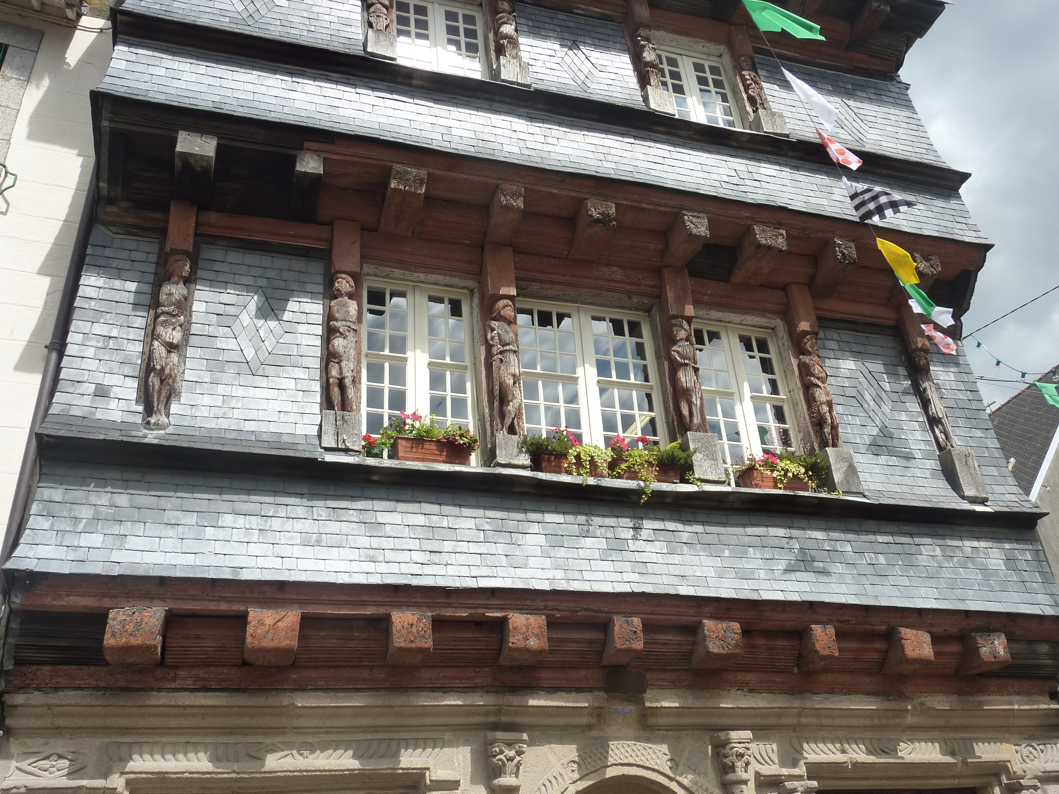 Carhaix-Plouguer : Maison du Sénéchal (XVIe) : détail de la façade